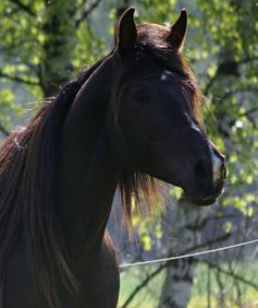 1320 Saklavi IV-CZ